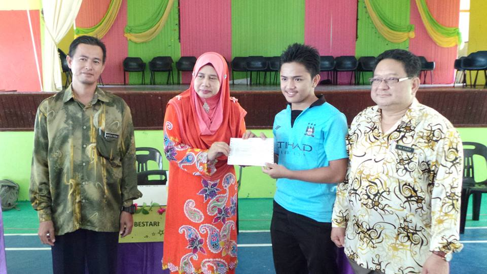 Pelajar cemerlang SPM